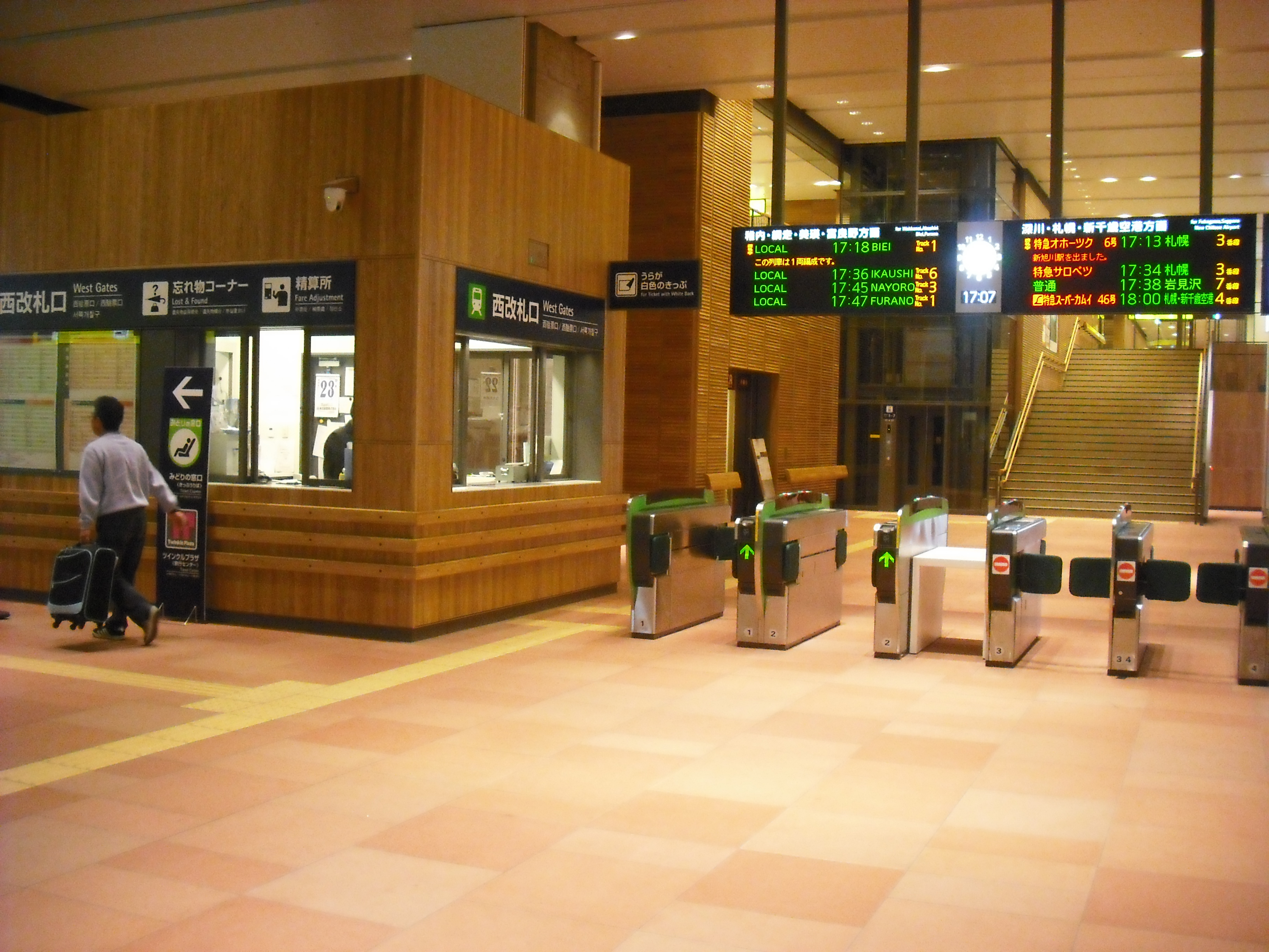 西改札口